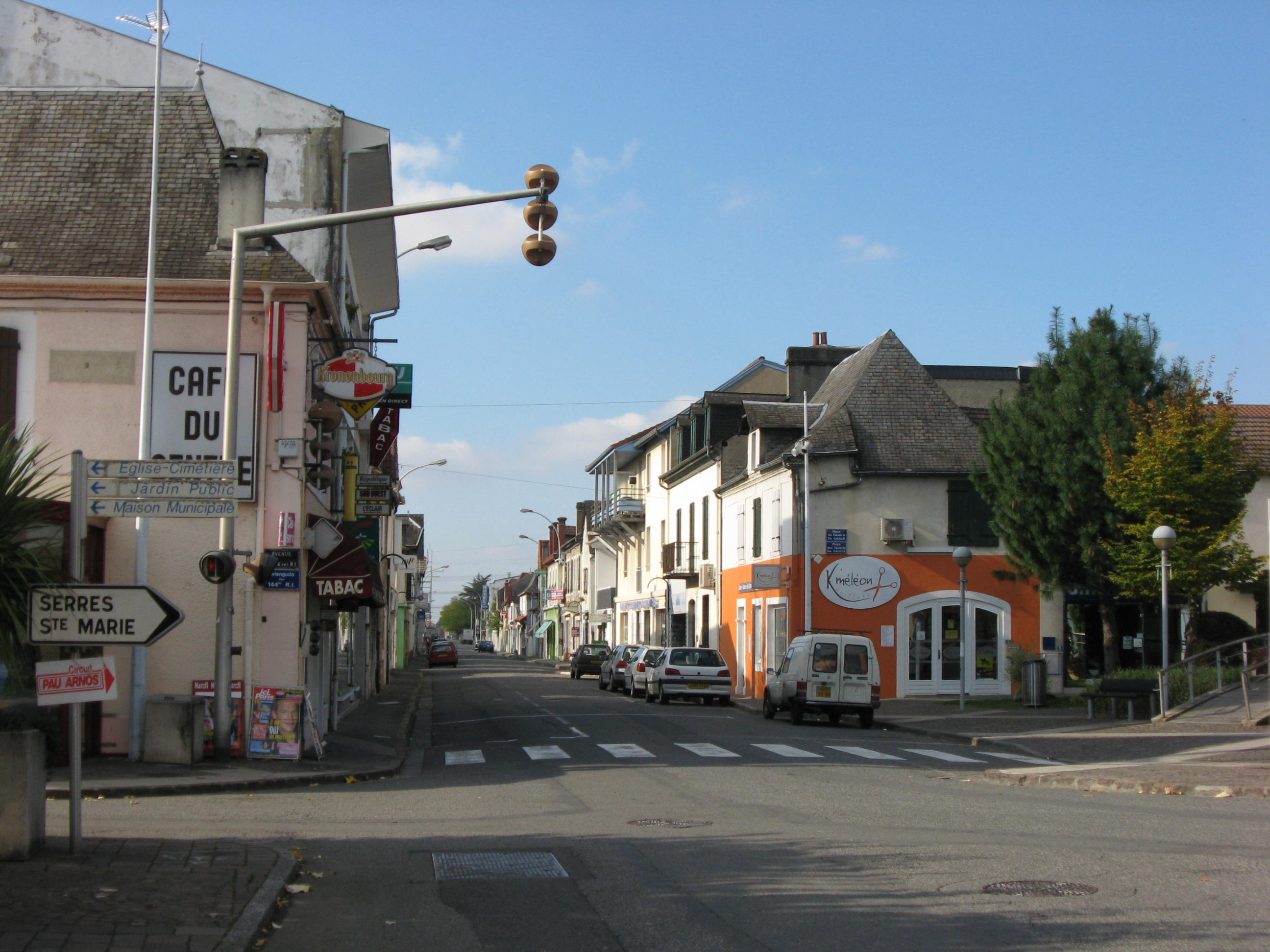 Vue de la rue principale d'Artix (Pyrénées Atlantiques) Pyrénées).